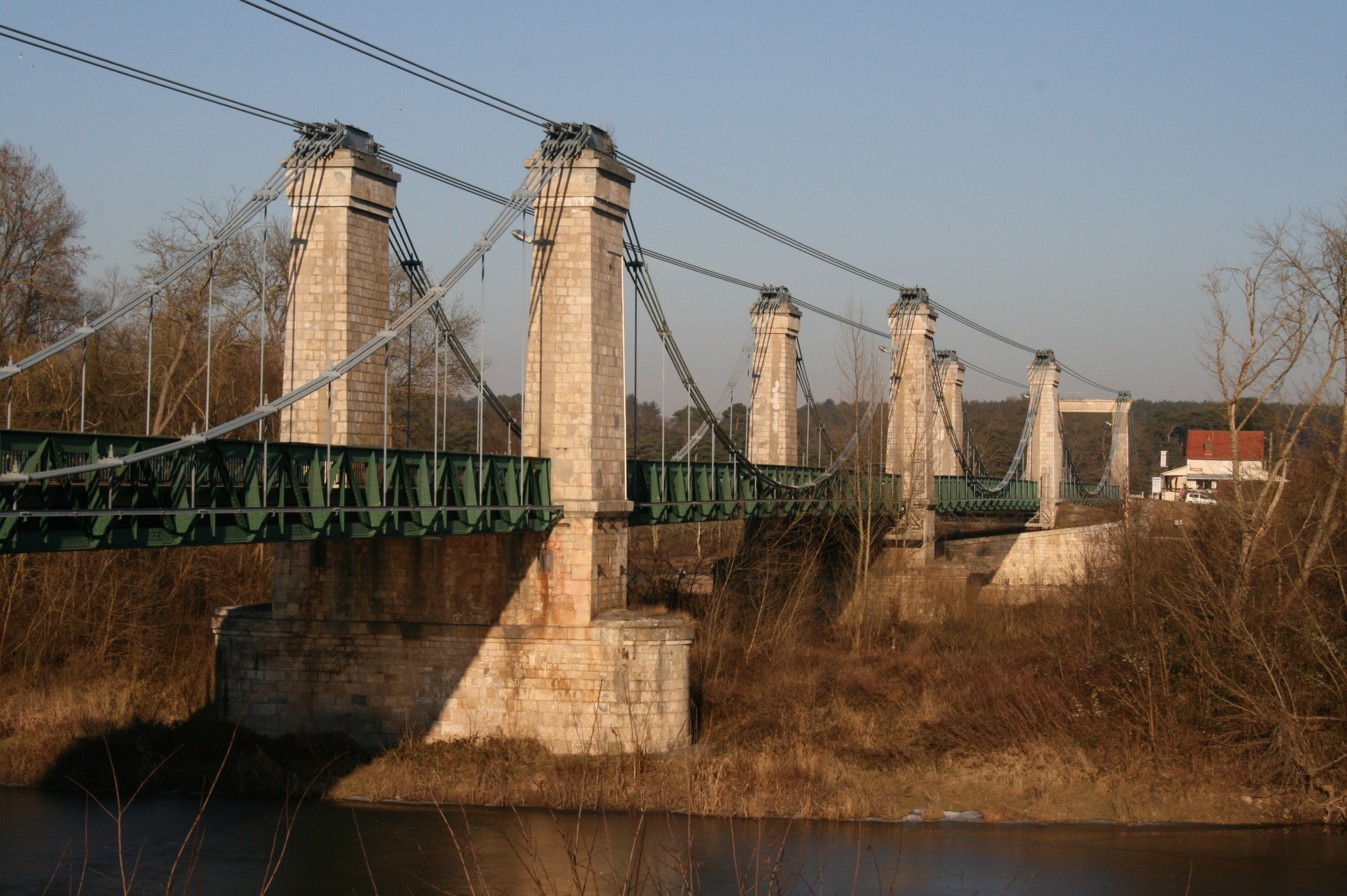 Pont de Châtillon-sur-Loire (Loiret - France) - Pont suspendu franchissant la Loire - Vue générale à partir de la rive gauche.